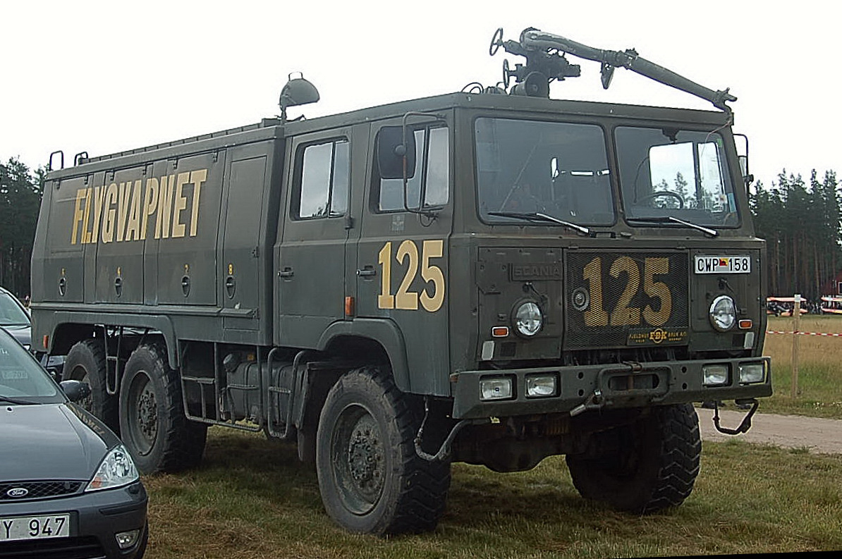 Fabrikat: SCANIA SBAT 111S F2 Färg: MGRÖN Fordonsslag: LB Fordonsår: 1979 Tekniska data Kaross: Lastbil (BA) Slagvolym, cm3: Växellåda: AUTOMAT/TILLSATS Totalvikt, kg: 16600 Max lastvikt, kg: 4180 Lastutrymmets längd, mm: 5000 Bakre överhäng, mm: 1350 Utrustning: VINSCH Drivande axlar fram: 1 Drivande axlar bak: 1 Antal hjul: 6 Antal axlar: 3 Garanterat axel/boggitryck 1: 5850 Garanterat axel/boggitryck 2: 11250 Max axelavstånd axel 1-2, mm: 3550 Max axelavstånd axel 2-3, mm: 1480